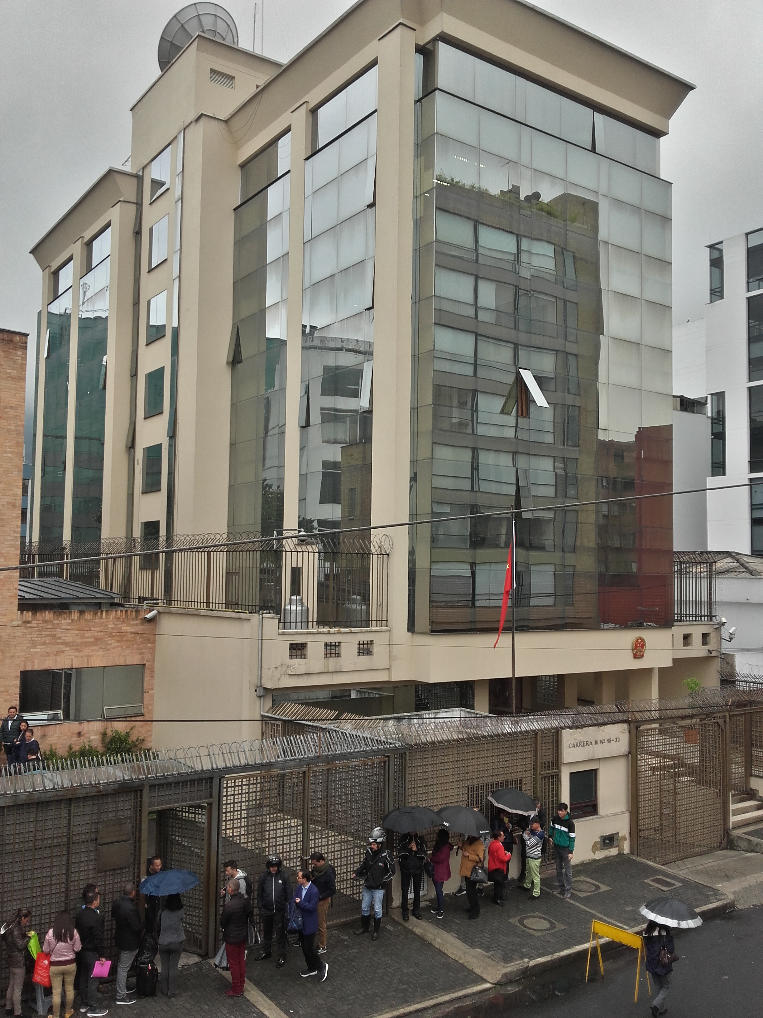 xknfmfmfmfn